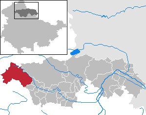 Helbedündorf in Thuringia - Kyffhäuserkreis